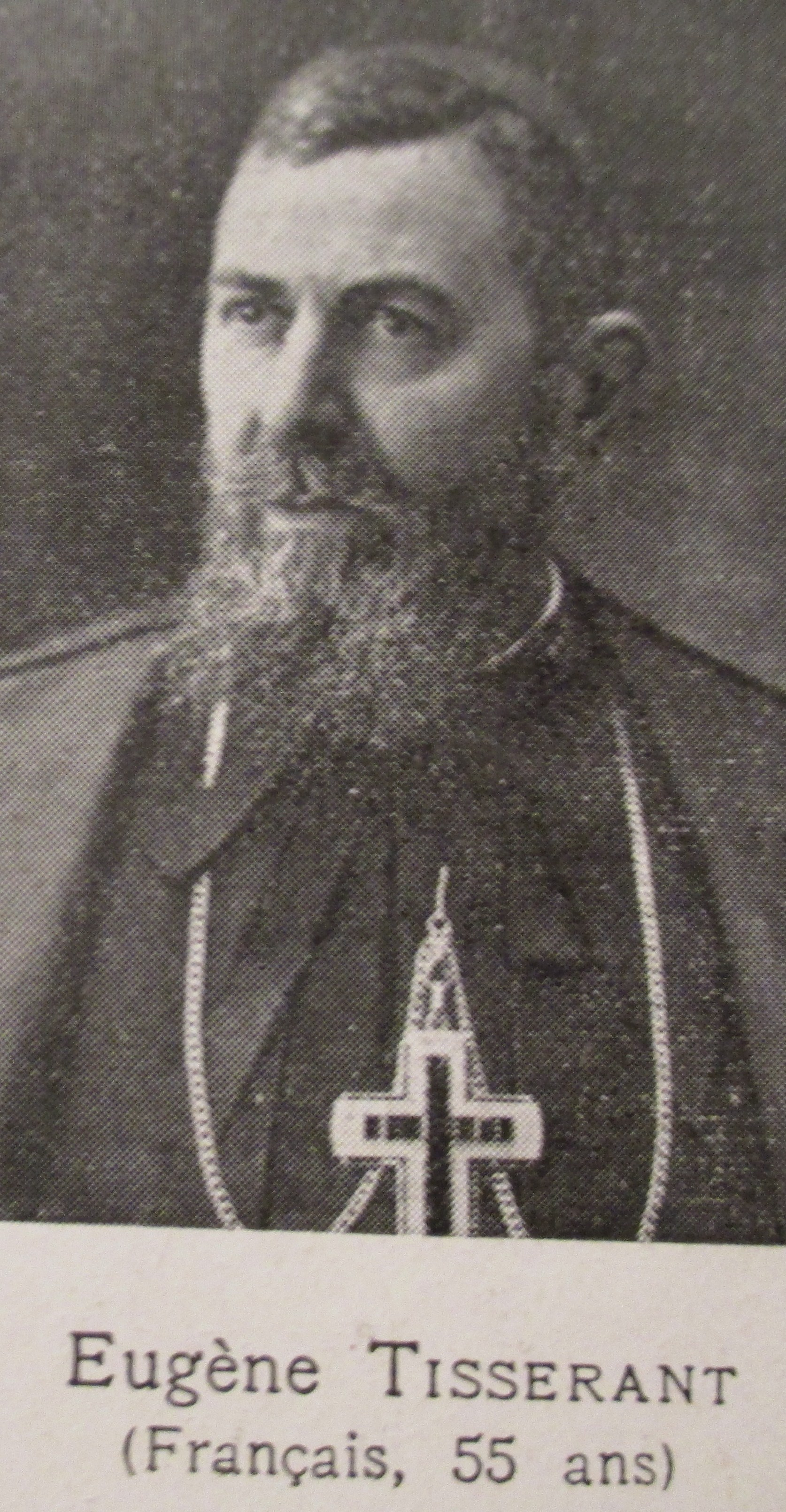 Le cardinal Tisserant, photographie dans L'Illustration, hors série de février 1939.